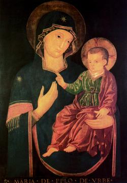 Icona della Consolata, Torino